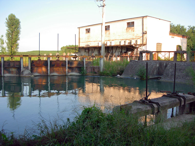 Centrale elettrica sul Diramatore Quintino Sella al confine tra Tornaco (NO) e Gravellona Lomellina (PV)